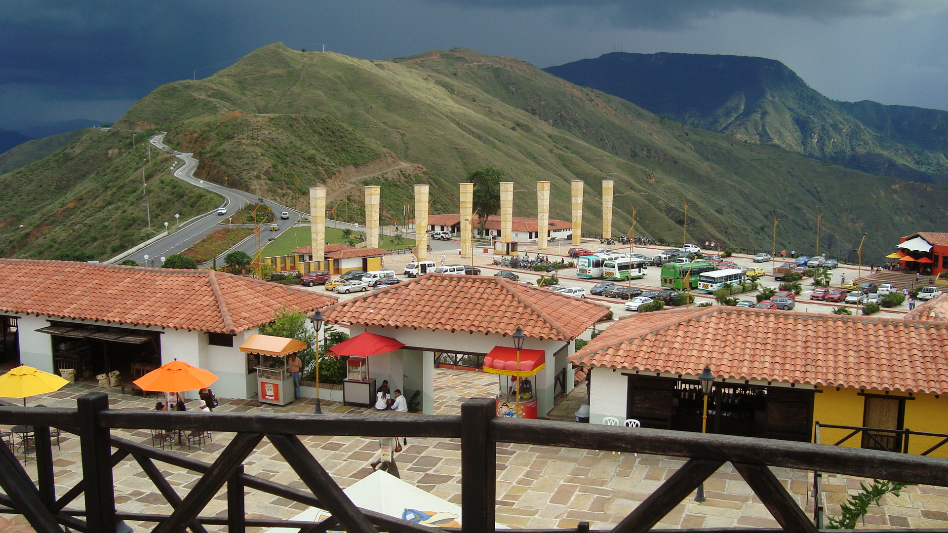 Panachi